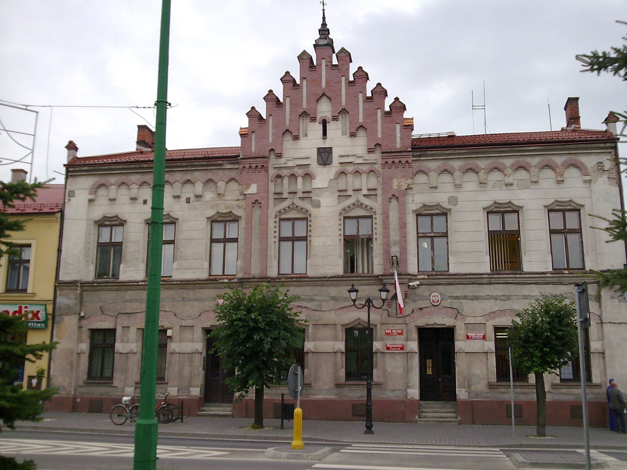 Ratusz w Zatorze